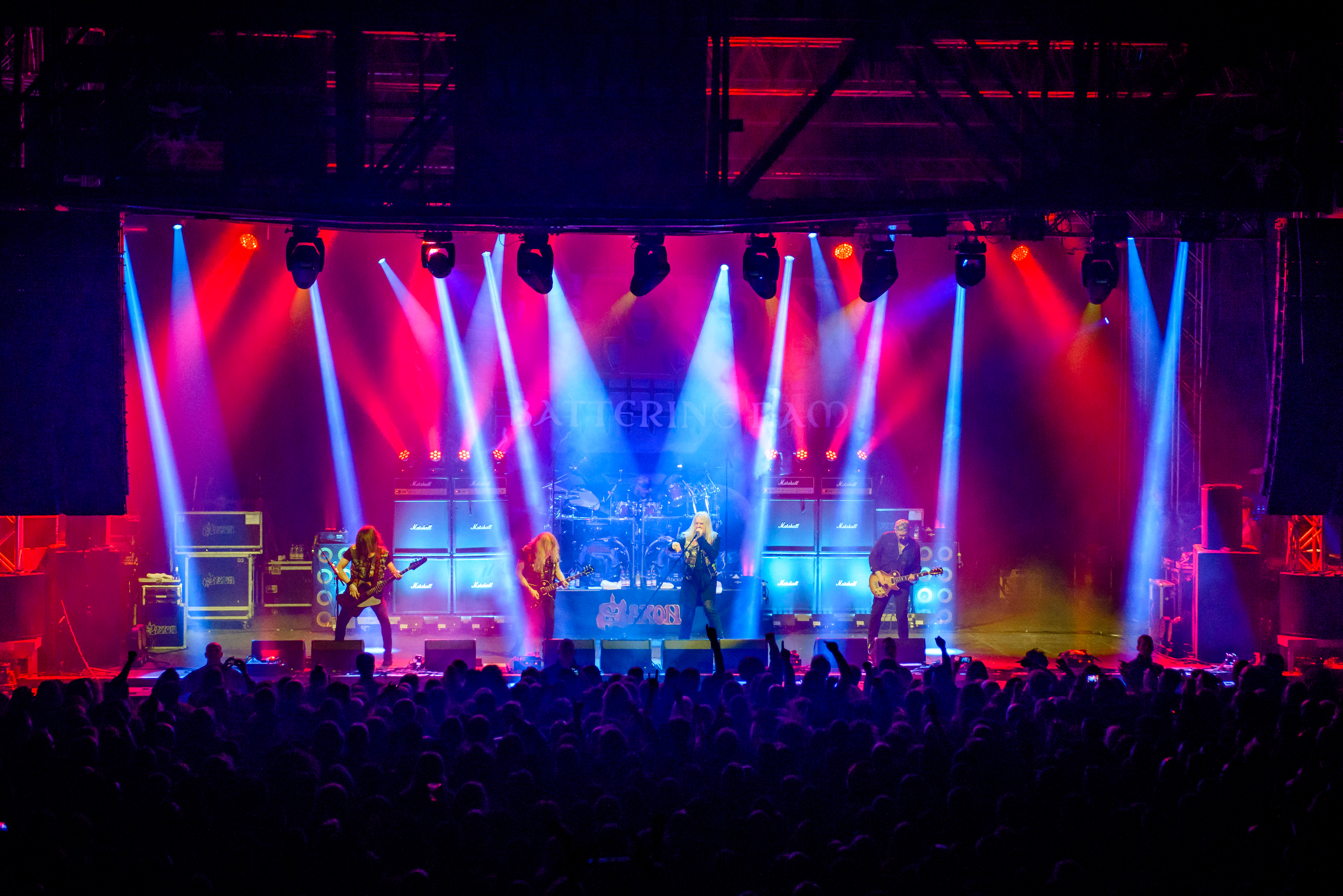 'Ruhrpott Metal Meeting 2016; Oberhausen Turbinenhalle': 'Saxon'